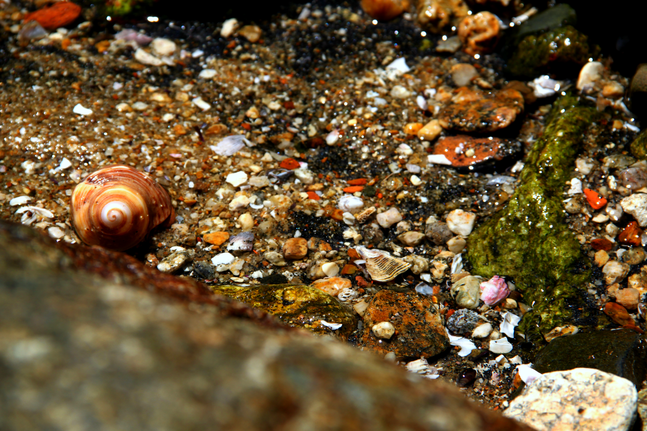 A formação geológica em Ilhabela são ricas e nos diz muito sobre o passado do nosso planeta. Sua peculiaridade ajuda pesquisadores a compreenderem o período do supercontinente Gondwana.